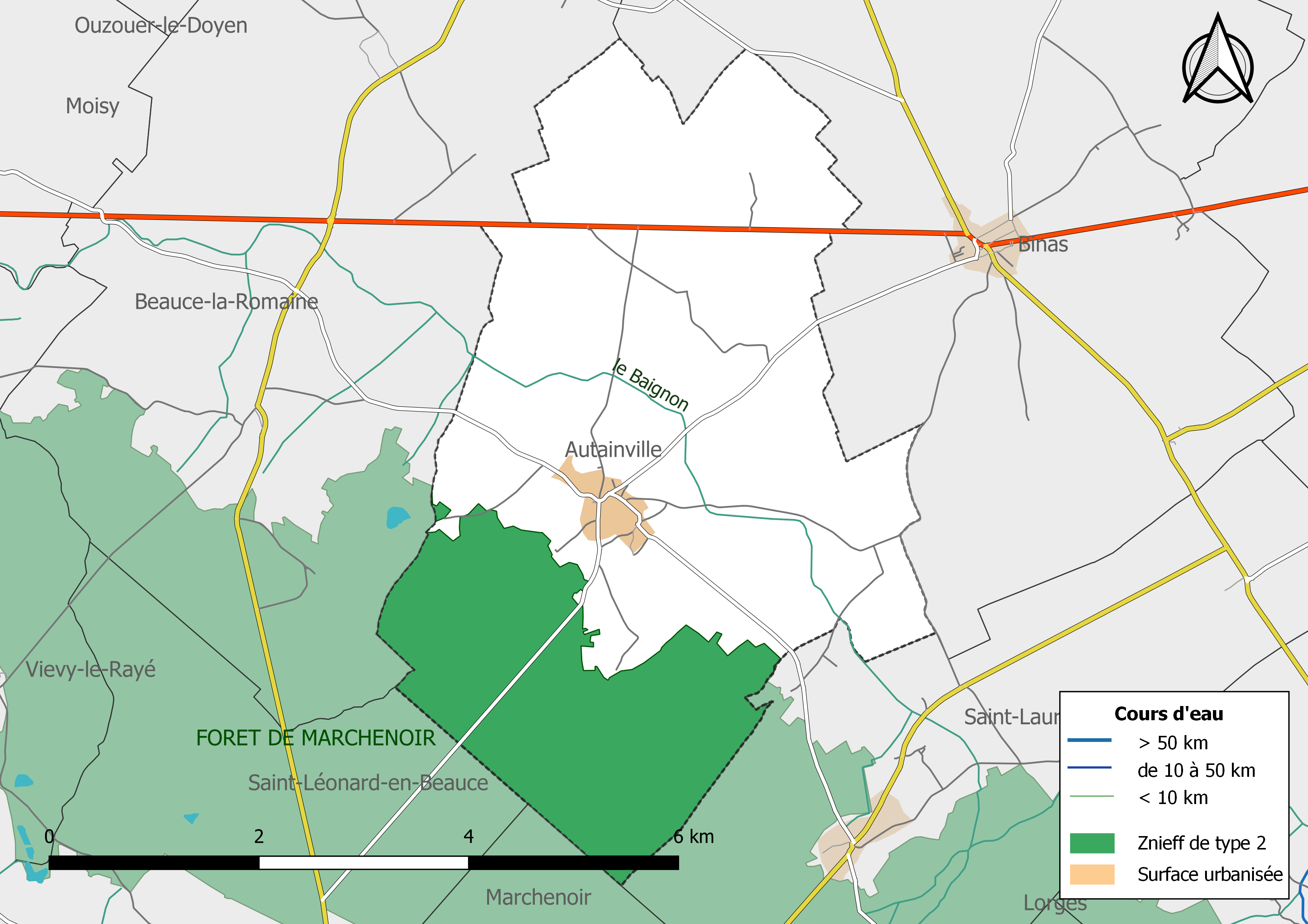 Carte des Zones naturelles d'intérêt écologique faunistique et Floristique (ZNIEFF) de type2 de la commune de Autainville (Loir-et-Cher, France).